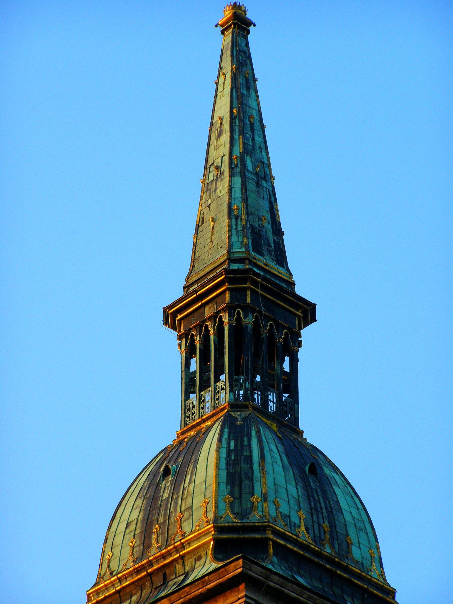 Detail veže katedrály s modelom kráľovskej koruny